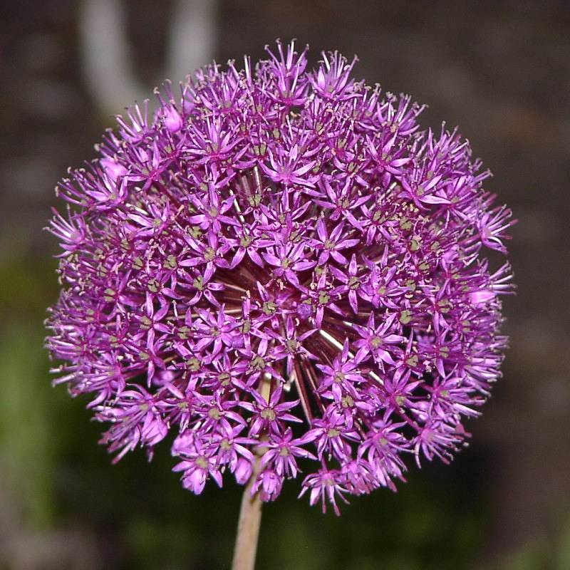 Sternkugellauch (Allium cristophii)